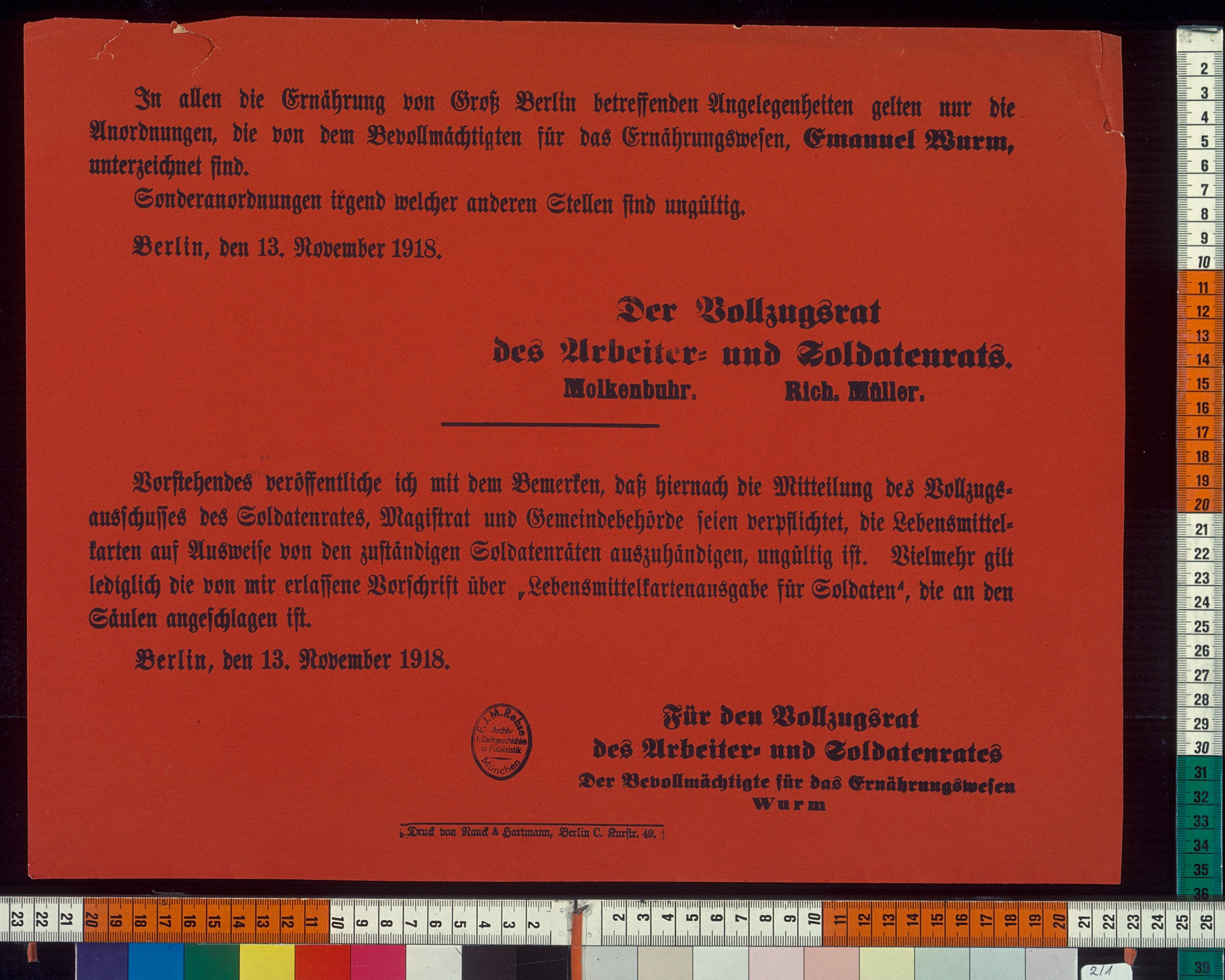 Am 12. November habe ich folgende Bekanntmachung erlassen: Arbeiter! Bürger! Zur Sicherstellung der Lebensmittelversorgung ist es unbedingt erdorderlich, daß rationierte Lebensmittel nur auf Karten verabfolgt und entnommen werden. —Emanuel Wurm, Staatssekretär für Ernährung (Plakat des Vollzugsrats des Arbeiter- und Soldatenrates Groß-Berlin vom November 1918)